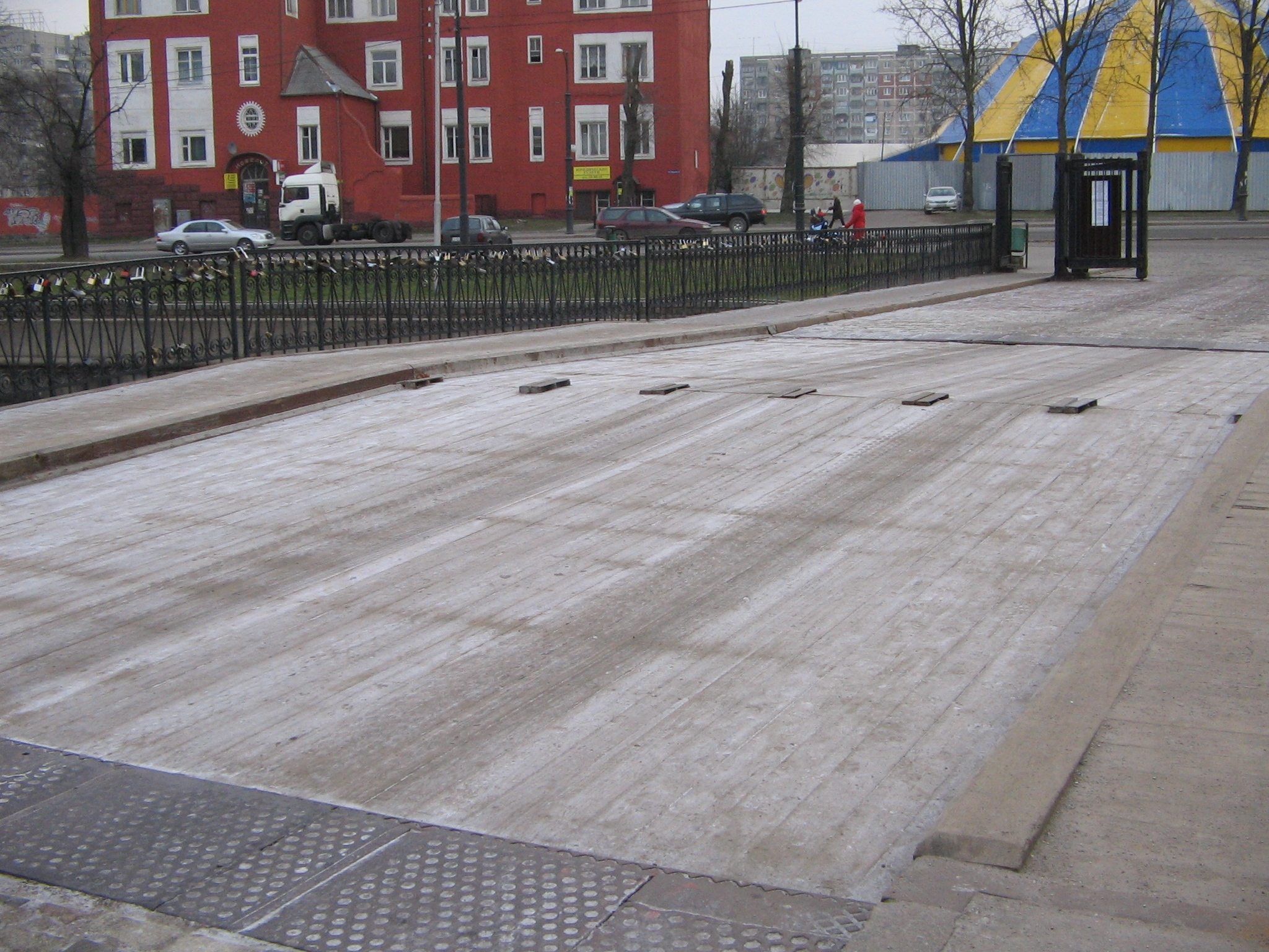 Медовый мост в городе Калининград, Россия, 26 декабря 2007. Вид сверху.